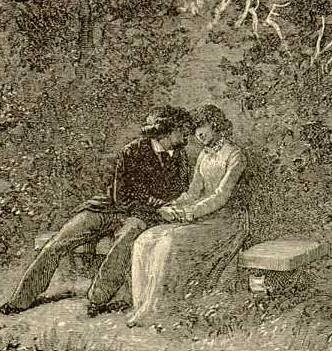 Parte da ilustração Les Enchantment et les desolations onde figuram Marius, Cosette e Jean Valjean